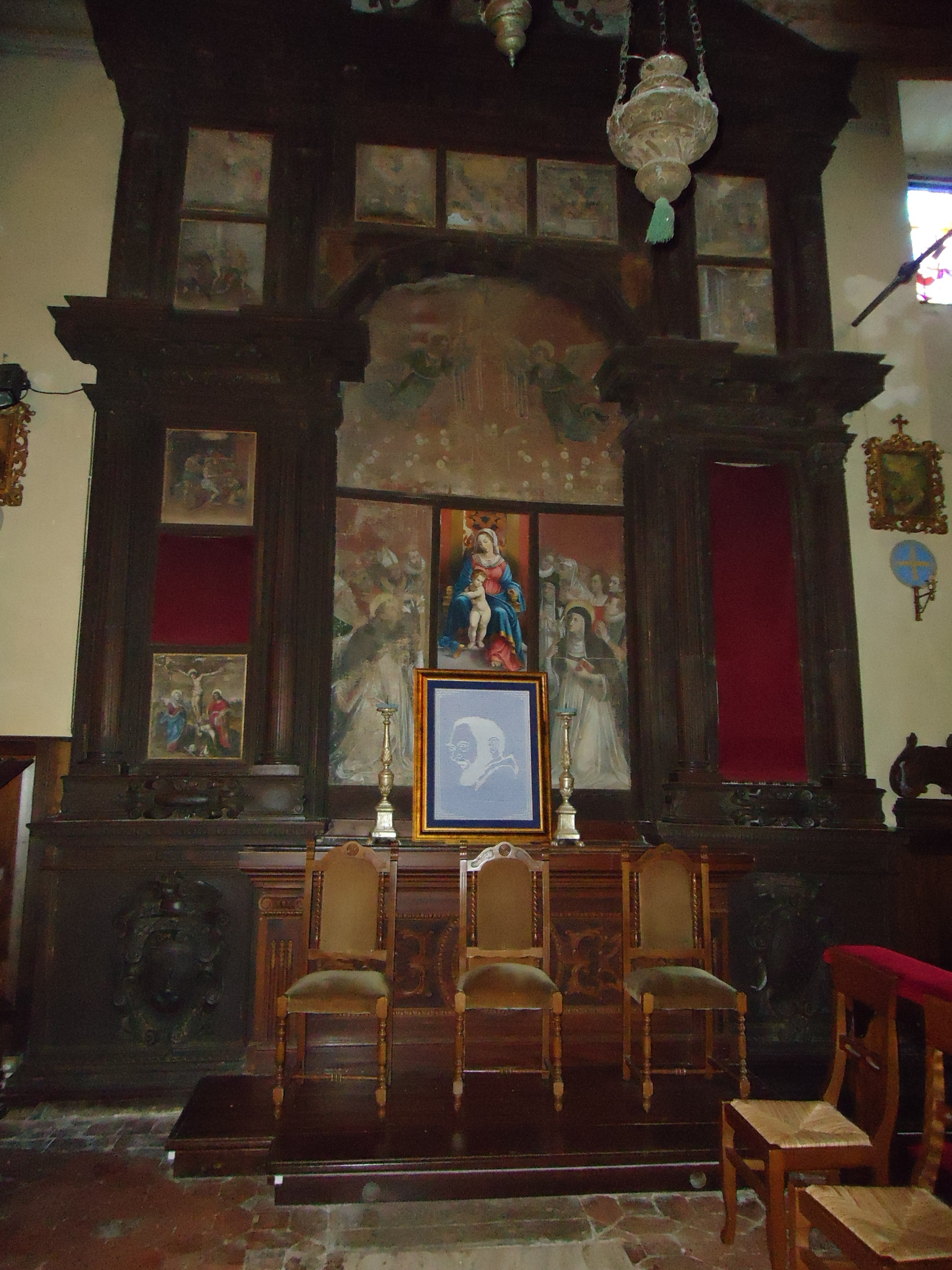 Altare con Madonna del Rosario - Santuario della Madonna delle Grazie - Varoni (Amatrice)